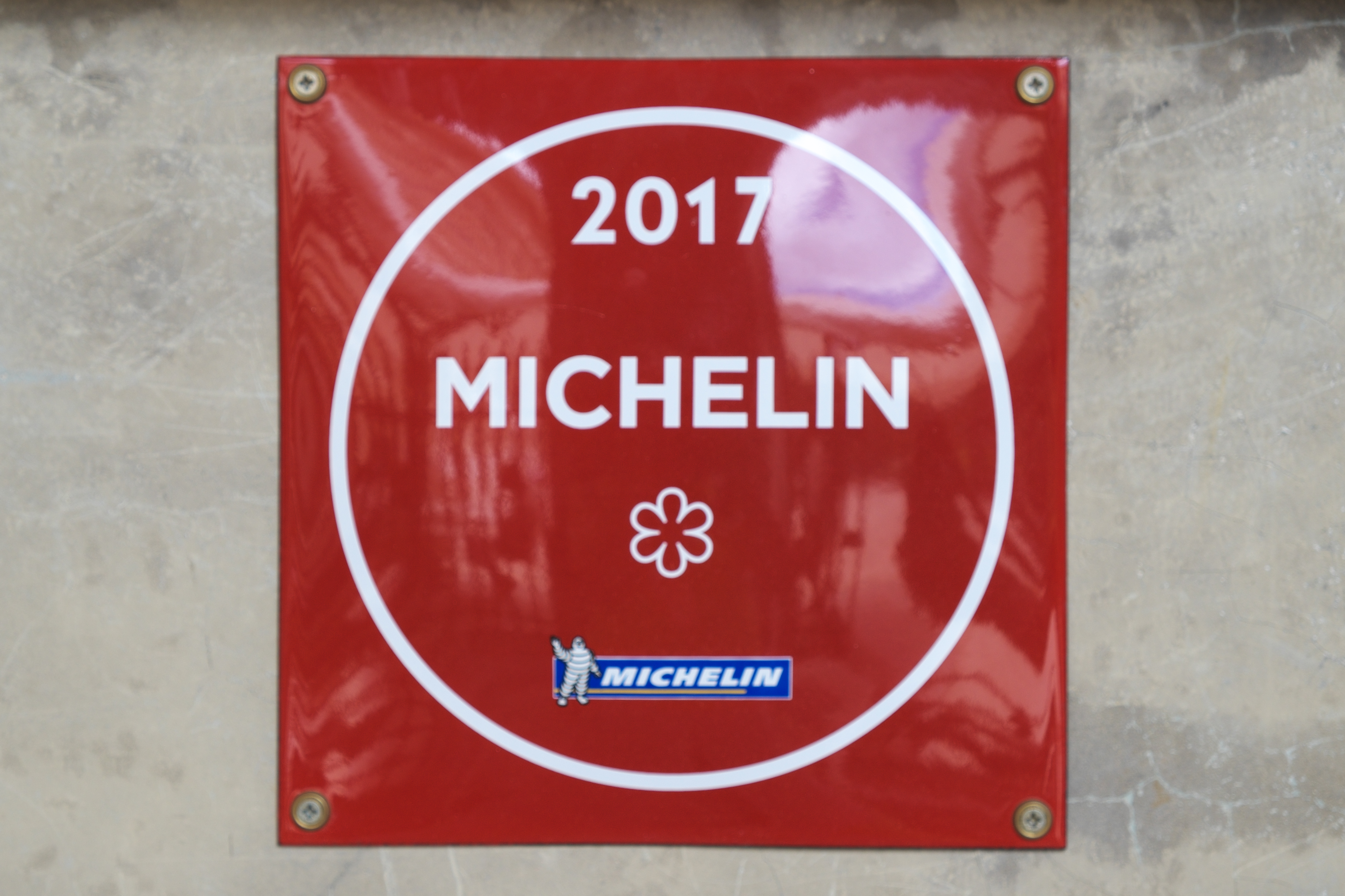 Palais Royal im 1. Arrondissement von Paris, Michelin-Plakette für ein Sterne-Restaurant